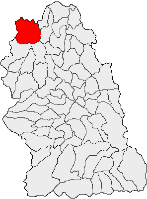 Categorie:Hărţi ale judeţului Hunedoara